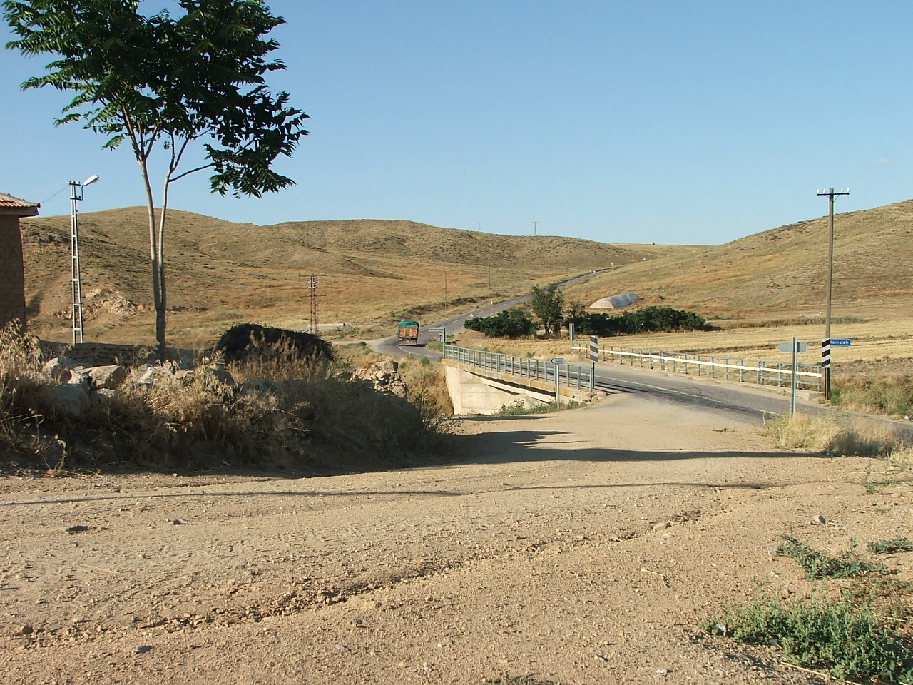 Yozgat'a bağlı Şefaatli ilçesinde bulunan Hamzalı köyünden bir görüntü.